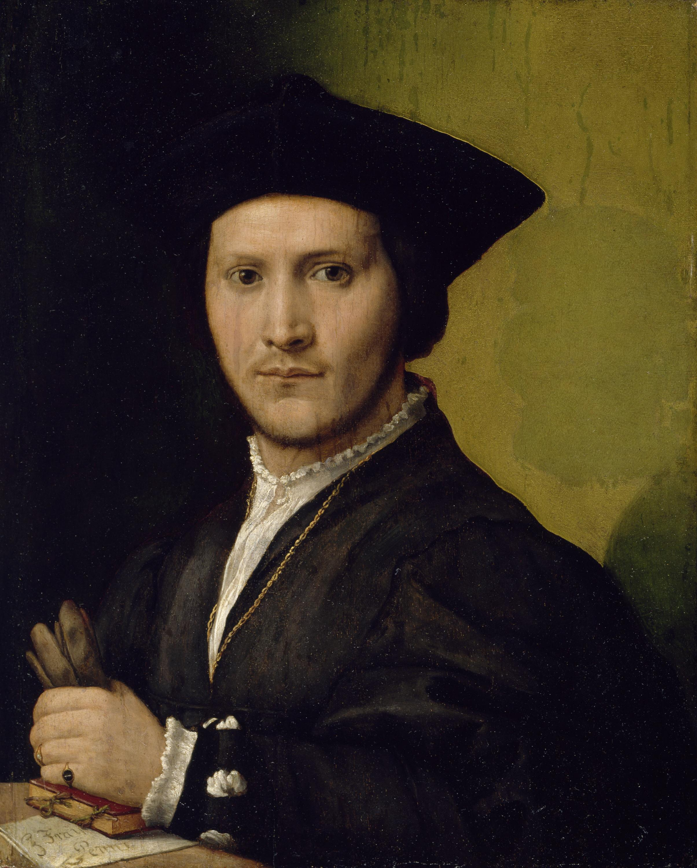 Ausschnitt aus einem Porträt eines jungen Mannes. Öl auf Holz, 52 x 41 cm, links unten signiert: G. Fran/ Penni